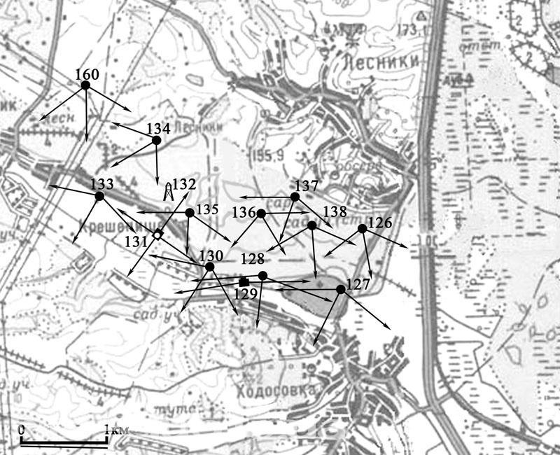 Схема БРО 8 Київського укріпленого району, викладена у вільний доступ авторами книги "Киевский укрепленный район 1928—1941" (